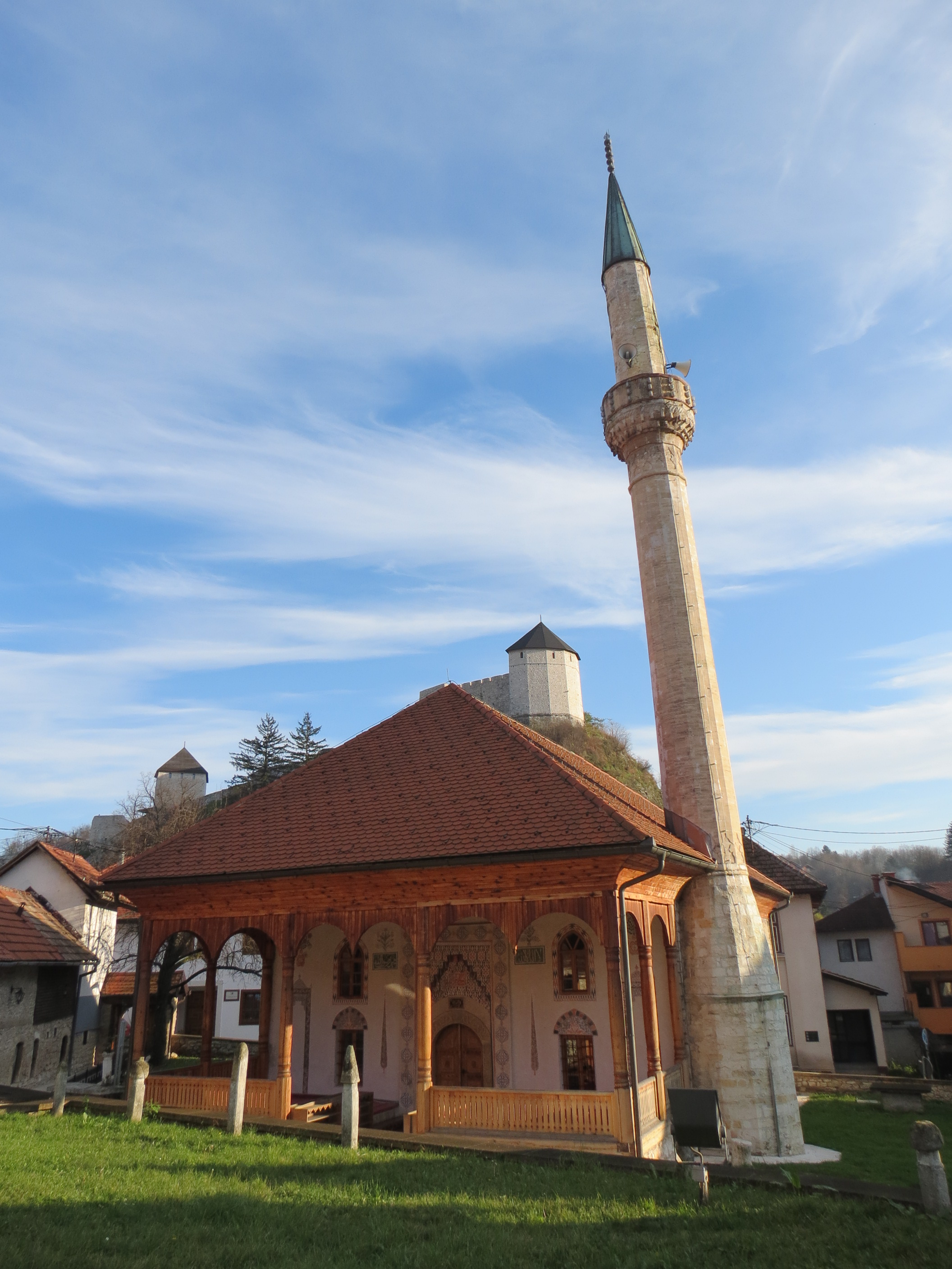 Tešanj - Mosquée de Gazi Ferhad Bey